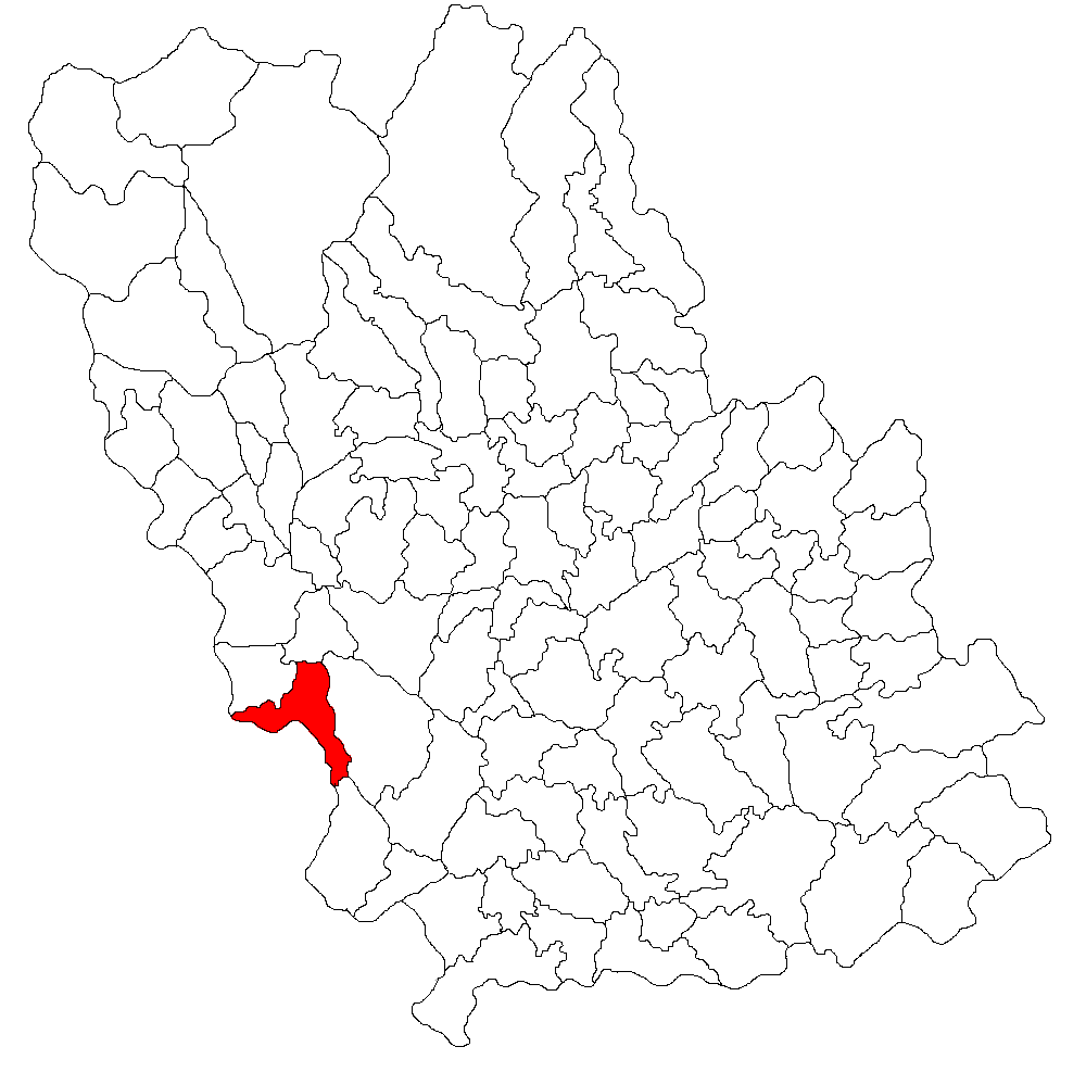 Categorie:Hărţi ale judeţului Prahova